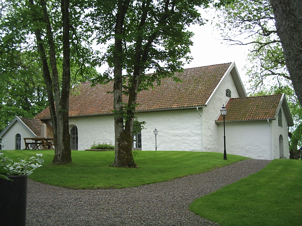 Rommele församlings kyrka. Fotograf: Tubaist